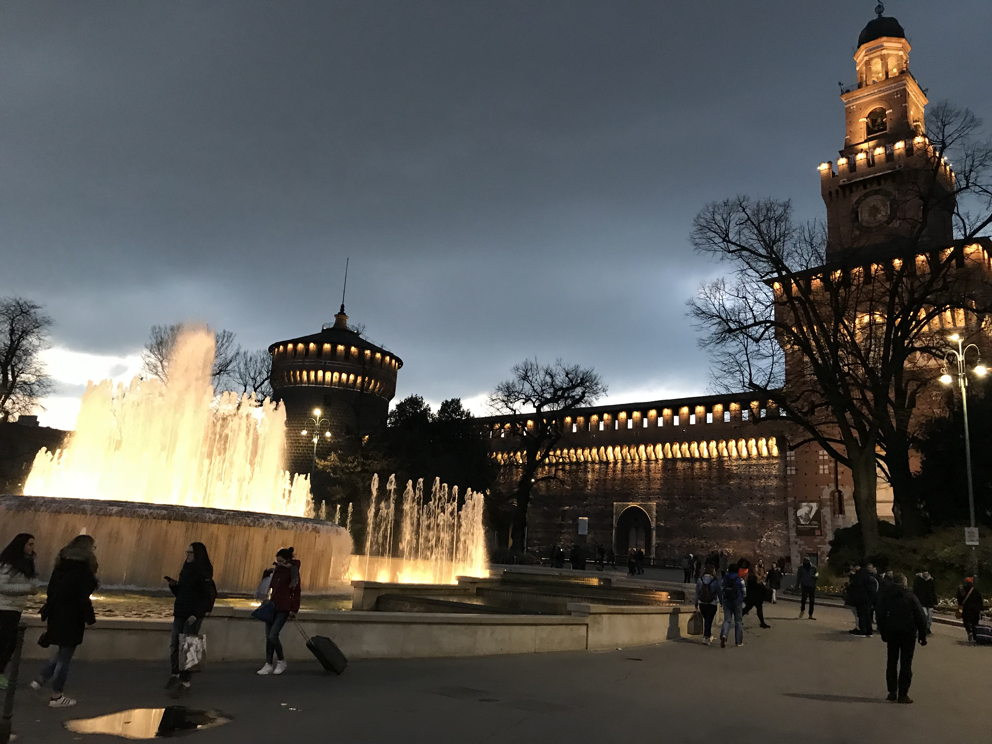 Torre del Filarete y la Fontana di Piazza Castello, de noche